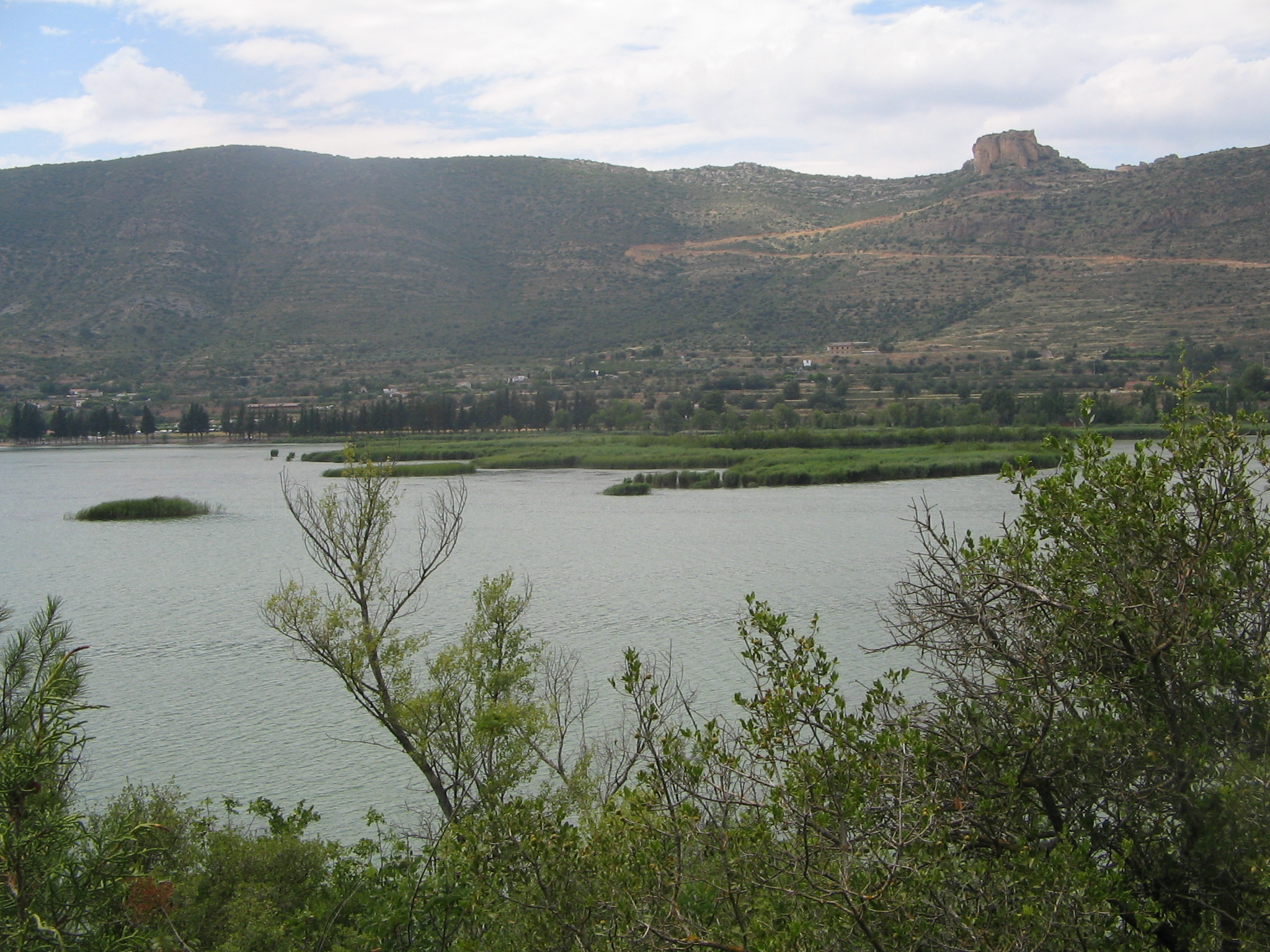 Laguna de Sant Llorenç de Montgai